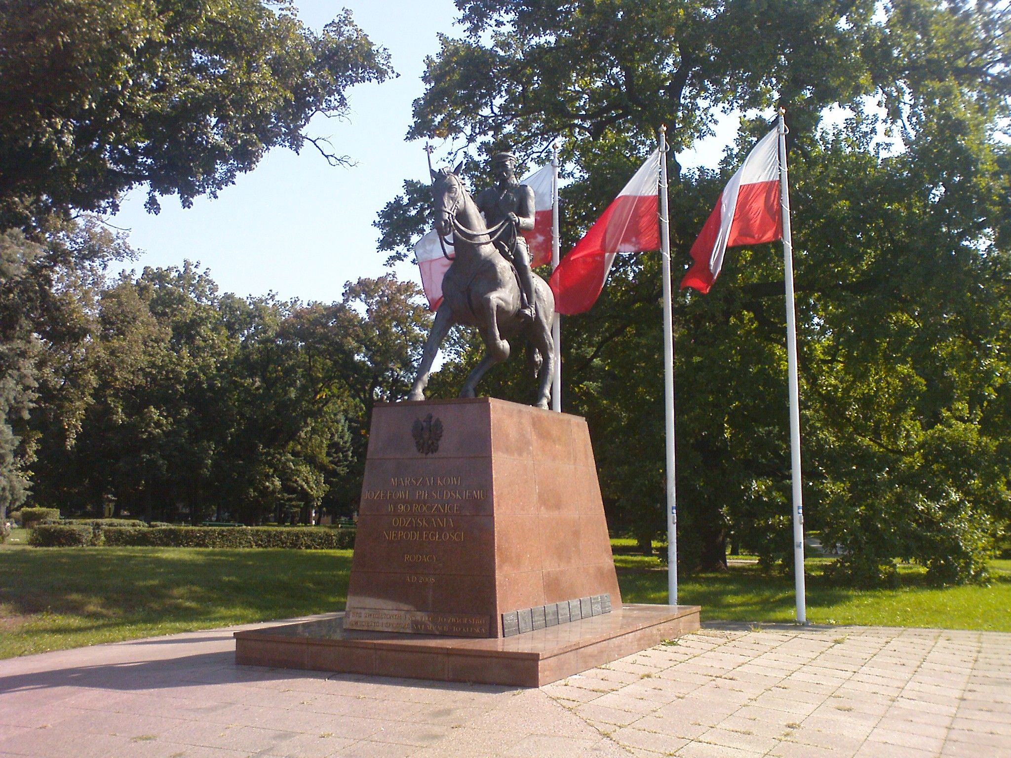 Pomnik Józefa Piłsudskiego w Gorzowie Wielkopolskim